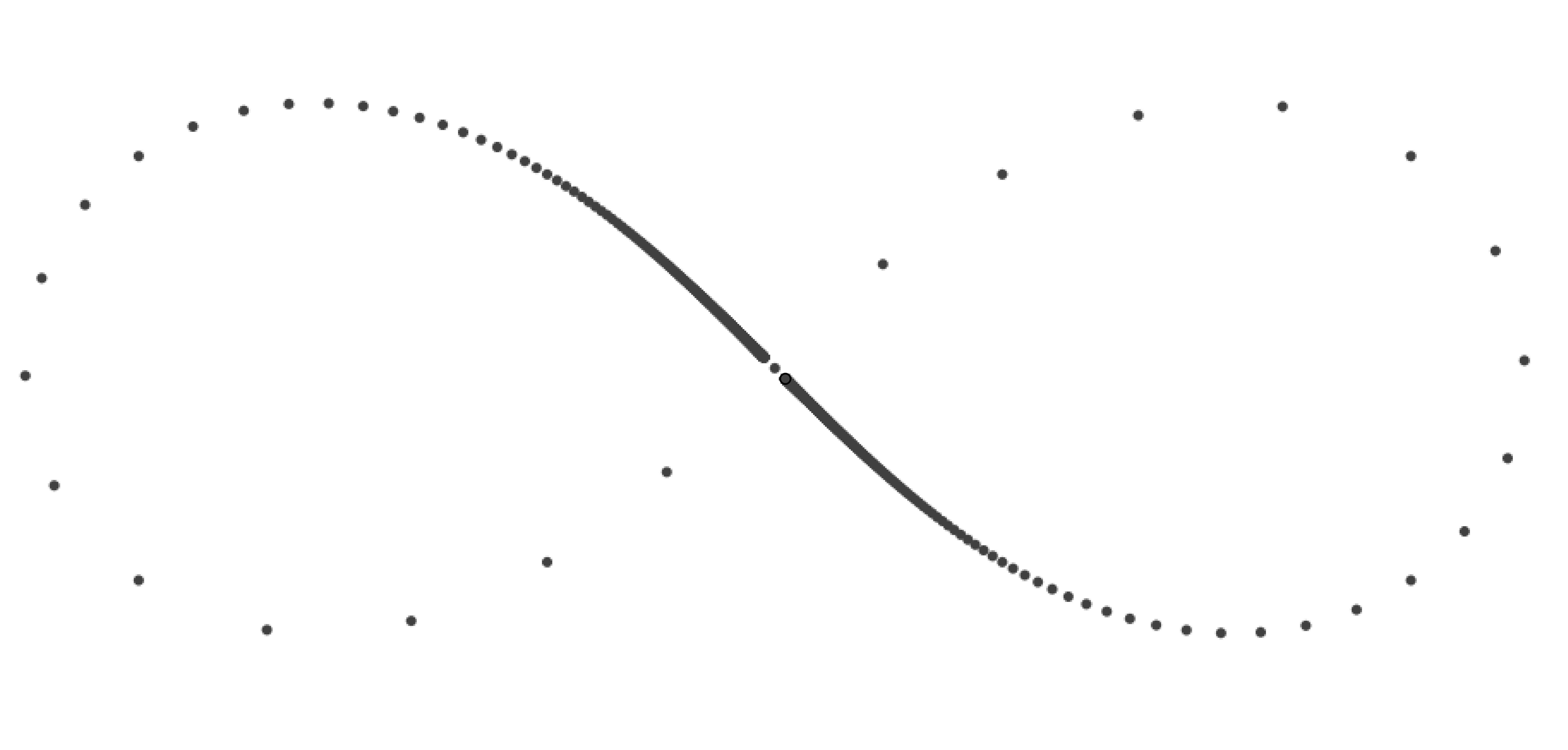 Traccia, derivata da una rappresentazione parametrica della Lemniscata di Bernoulli, lasciata da un punto al variare regolare del parametro t.